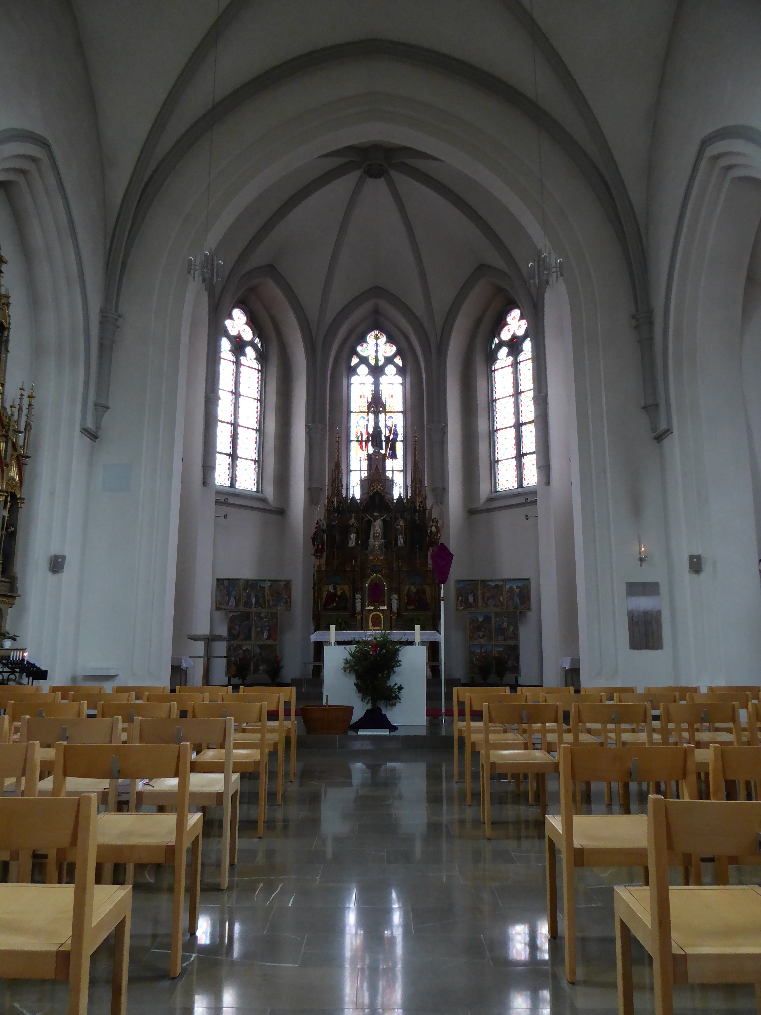 Pfarrkirche Ruggell FL: Altarraum, Ende der 1990er-Jahre neu gestaltet